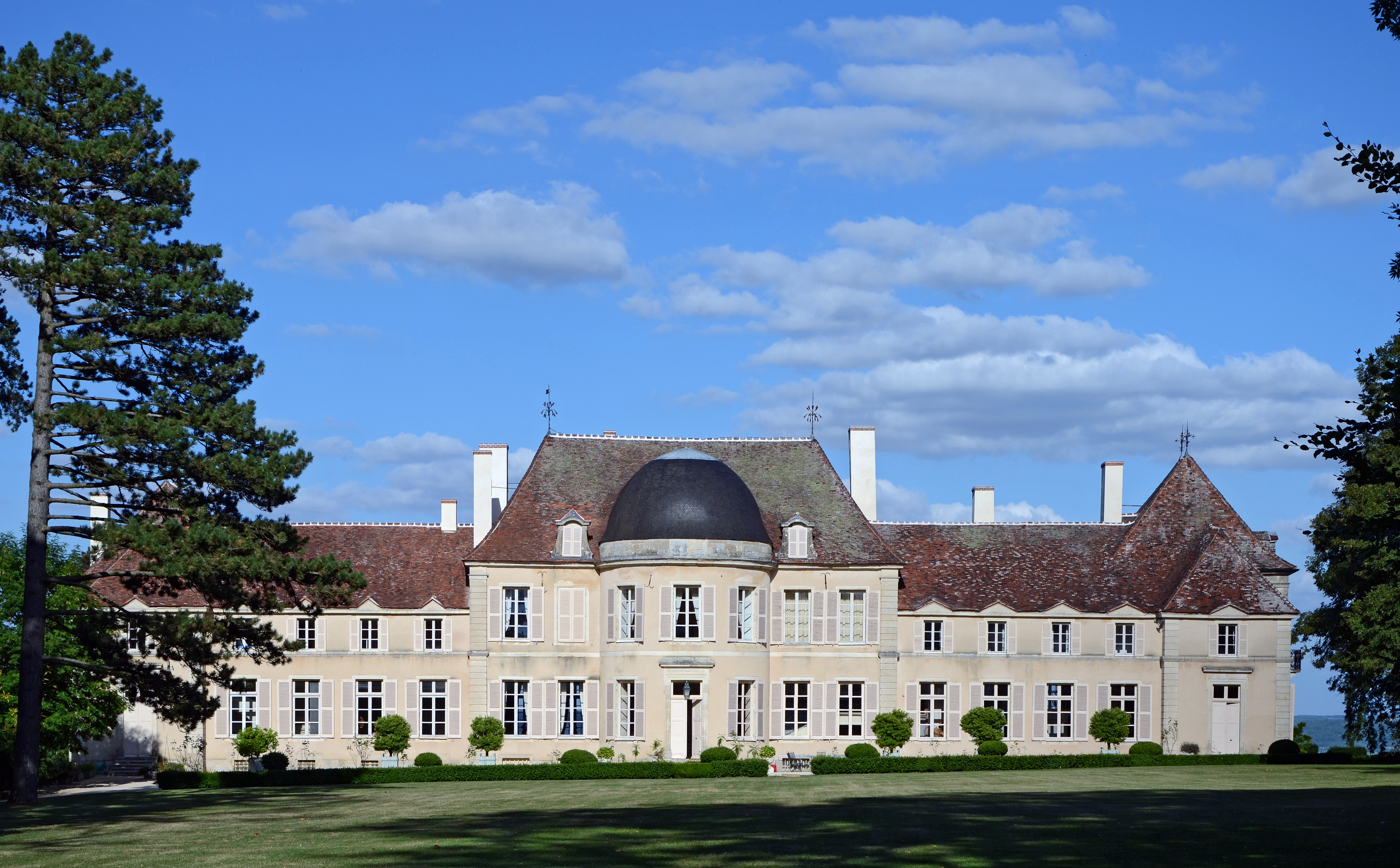 Chateau de Lantilly, Côte d'Or, France .